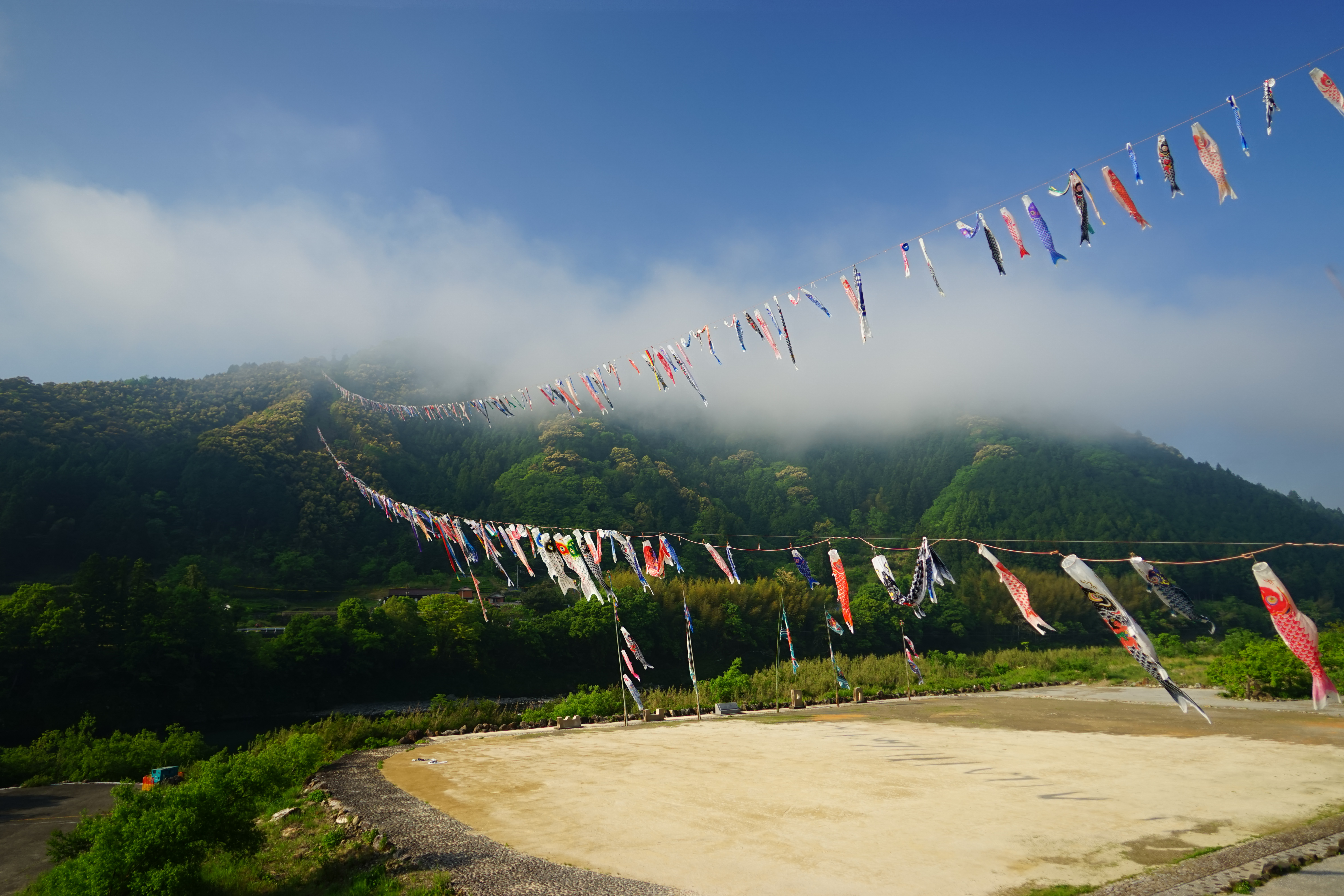 こいのぼり公園